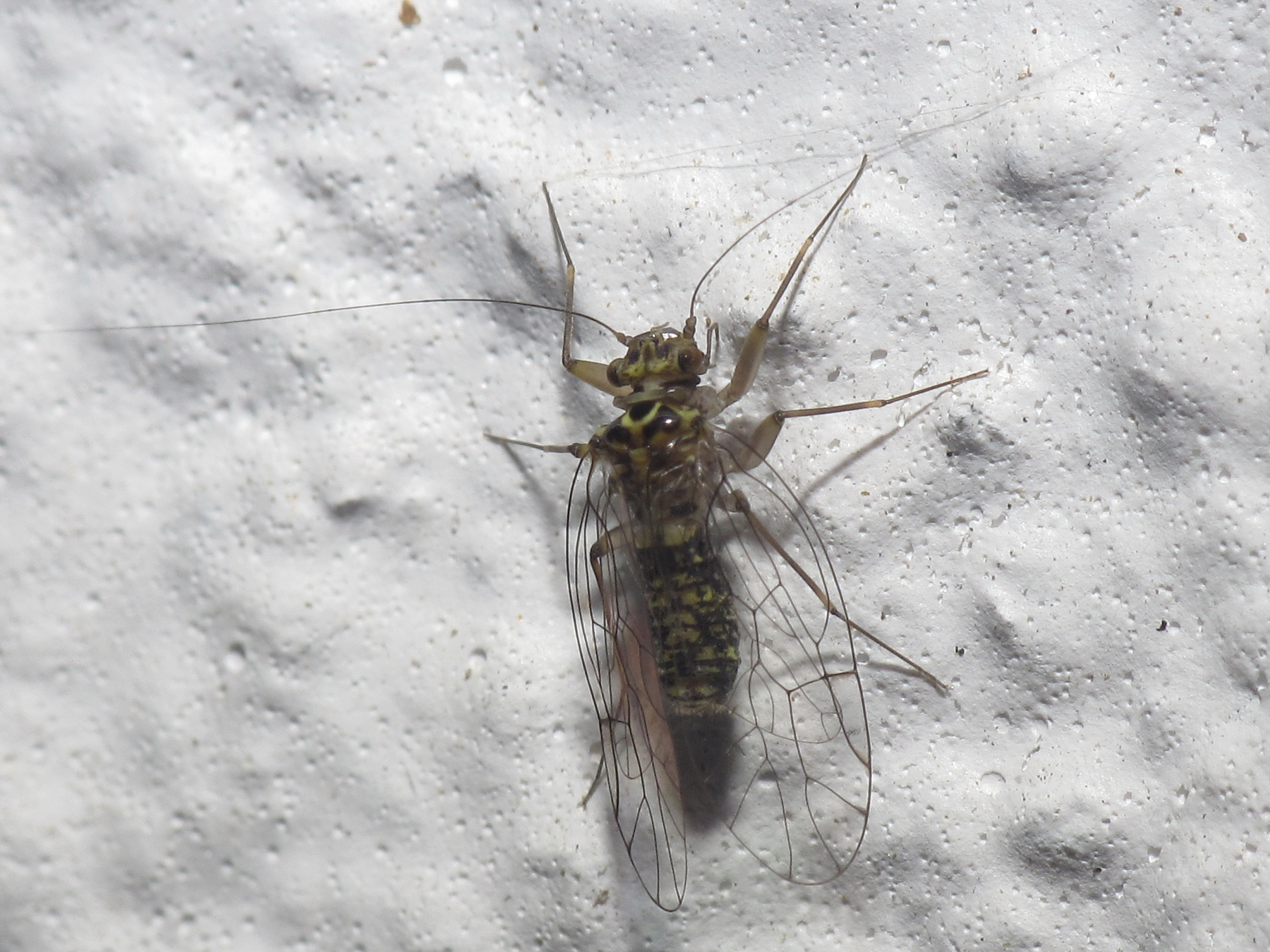 Mosca en Bastavales, Brión, Galiza